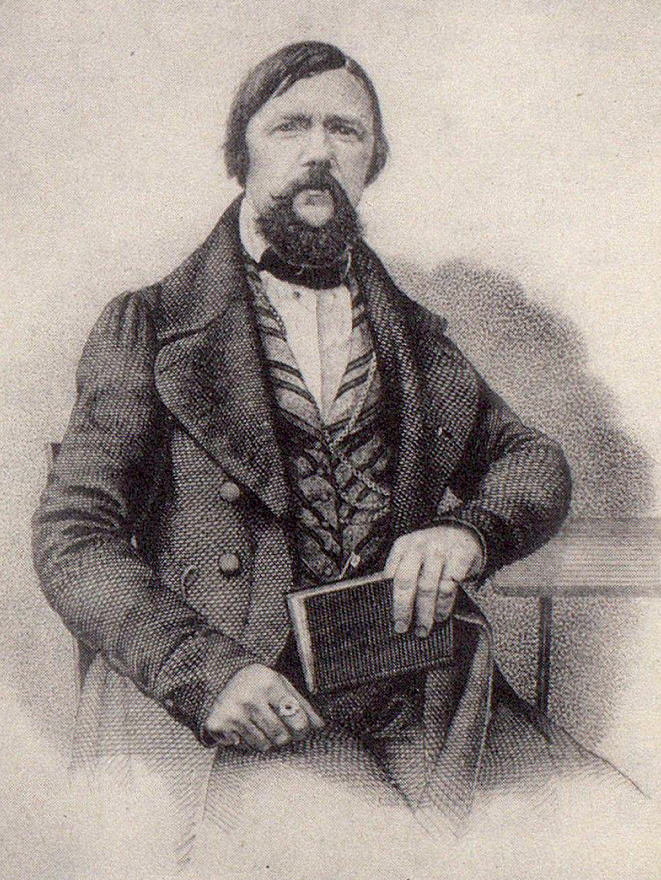 Engraving